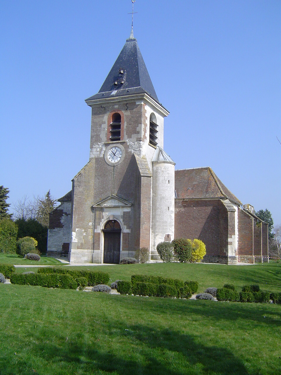 Laines-aux-Bois - L'église